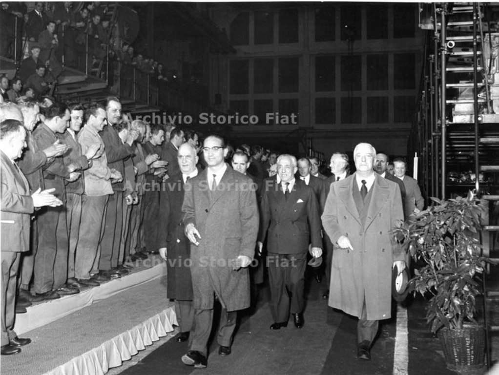 Fotografia a figura intera del ministro Emilio Colombo accompagnato dal professor Vittorio Valletta, dall'ingegnere Gaudenzio Bono, dall'ingegner Arnoldo Fogagnolo e da altre autorità. Visita alla sala prove della Fiat Grandi Motori per il per il conferimento del premio ANIAI al motore marino 7512.S, quale migliore realizzazione di ingegneria meccanica, Torino (Fiat Group Marketing & Corporate Communication spa, Archivio e centro storico Fiat, Archivio iconografico, Premiazioni, b. PR 12)